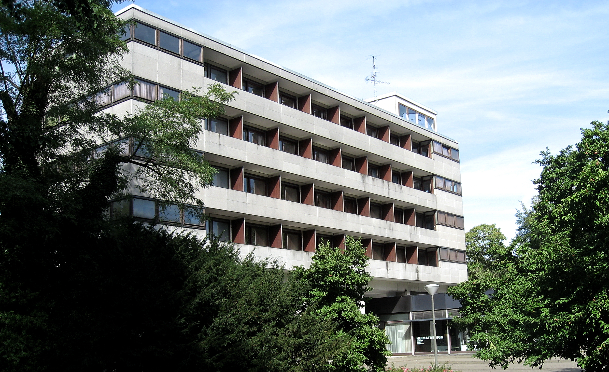 Dortmund, Rombergpark, Hotel Rombergpark, Leerstand, 50er-Jahre Architektur vor dem Abriss